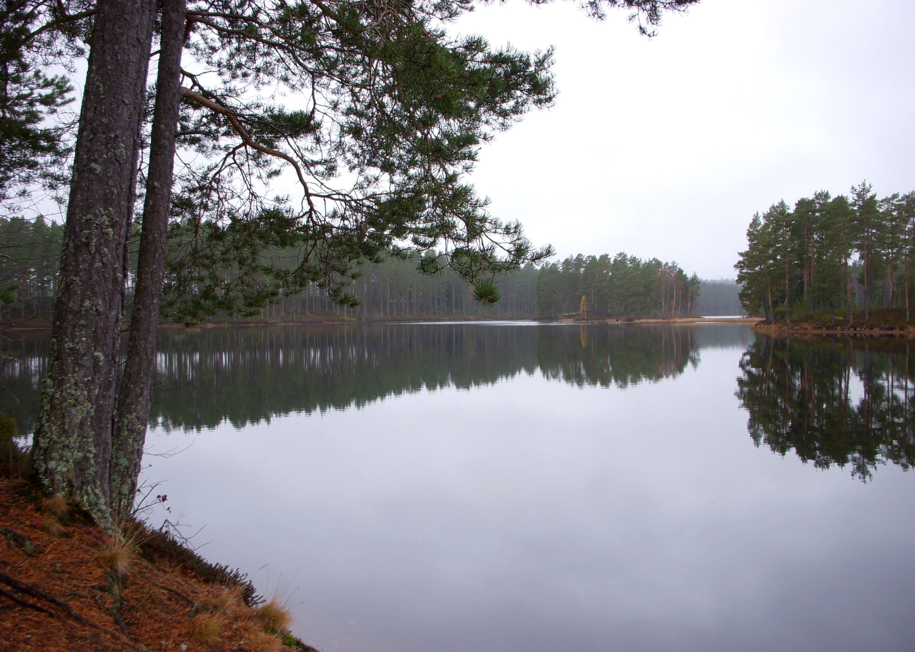 Naturreservatet "Malingarna" i Dalarna, vy mot norr